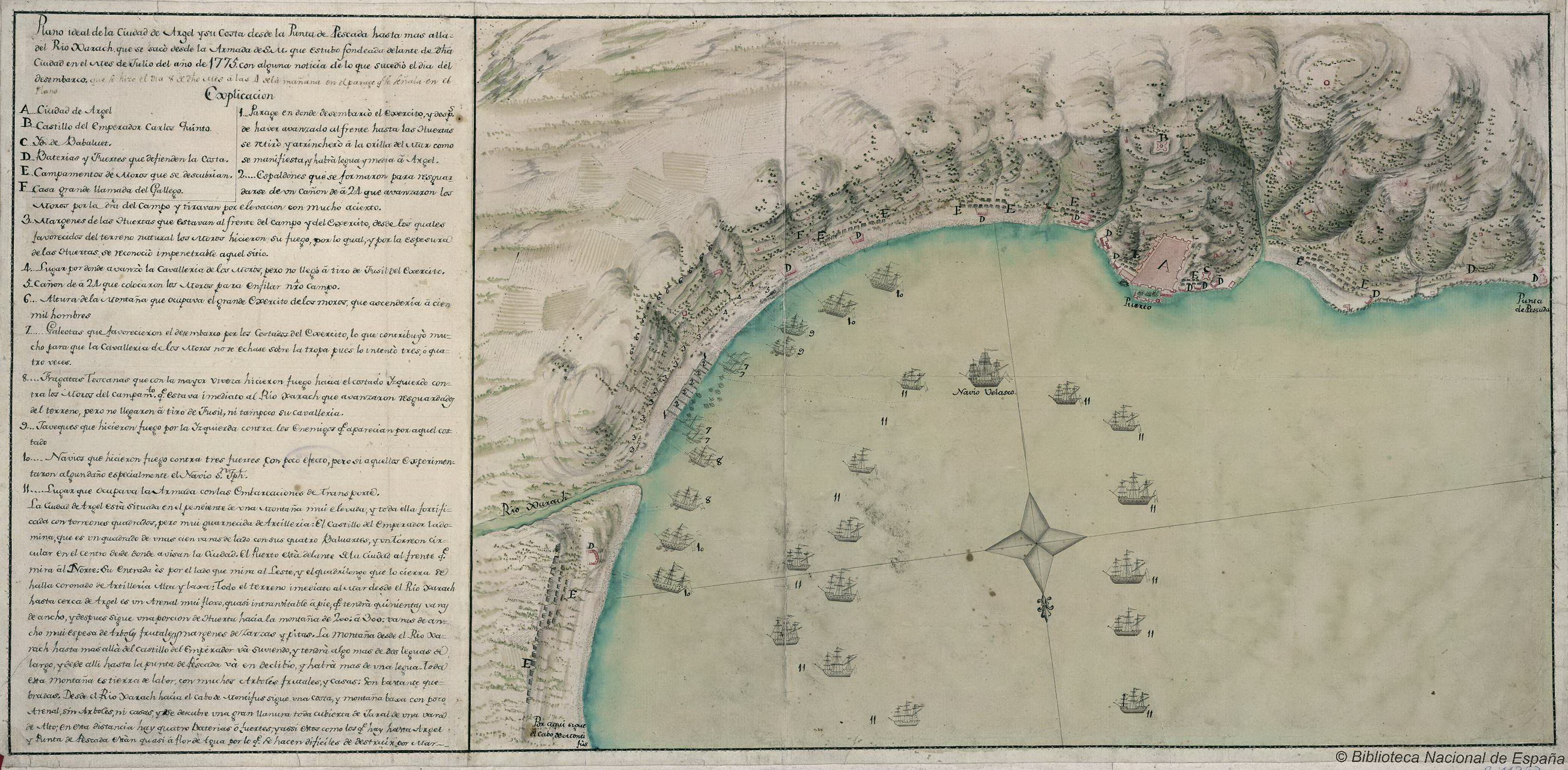 Plan de la ville et du site d'Alger ; utilisé lors de l'expédition espagnole de 1775